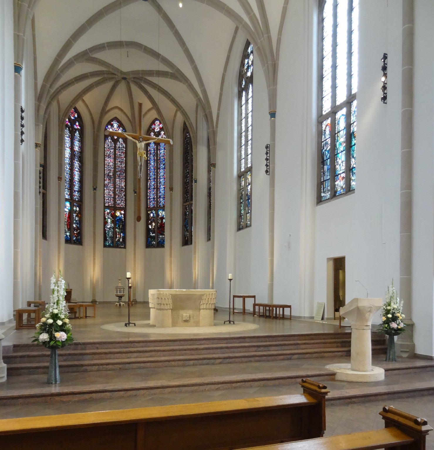 Propsteikirche St.Johann in Bremen - Innenansicht des Chores nach der Renovierung von 2016. Altar und Ambo wurden, wie auch das Tabernakel, im Jahre 1994 vom Bildhauer Johannes Niemeier geschaffen.